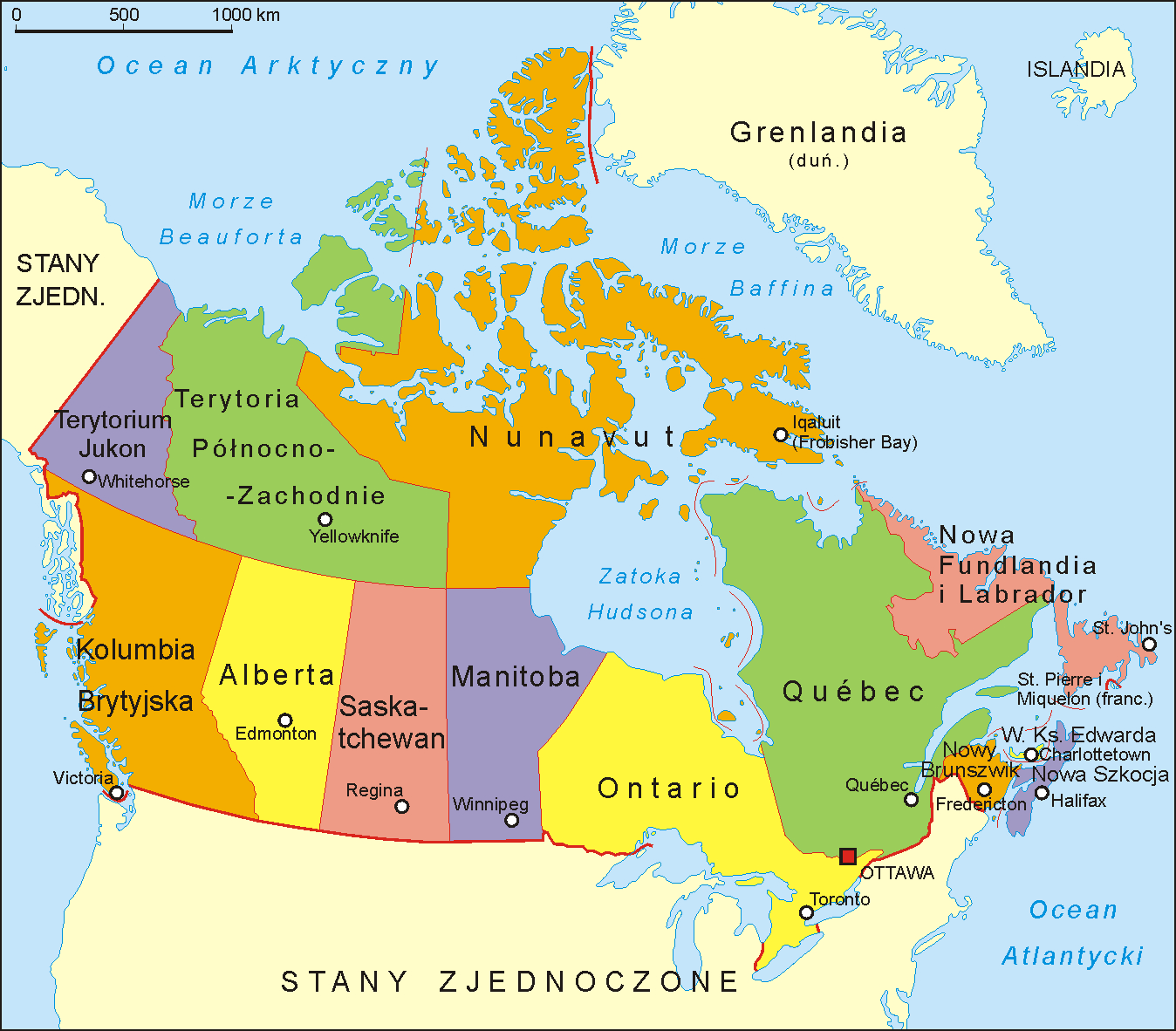 Mapa administracyjna Kanady. Autor Aotearoa